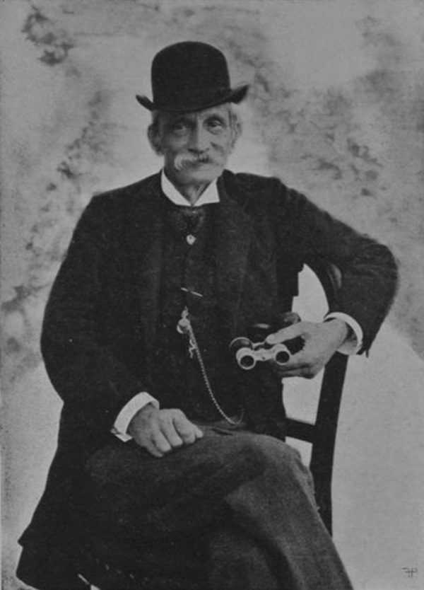 Giuseppe Zanardelli negli ultimi anni di vita. Tratto da "Raccolta dei principali discorsi commemorativi di Giuseppe Zanardelli", Brescia, Apollonio, 1909